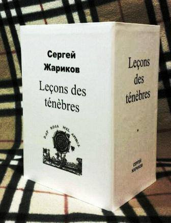 трилогия Сергея Жарикова "Уроки Тьмы"